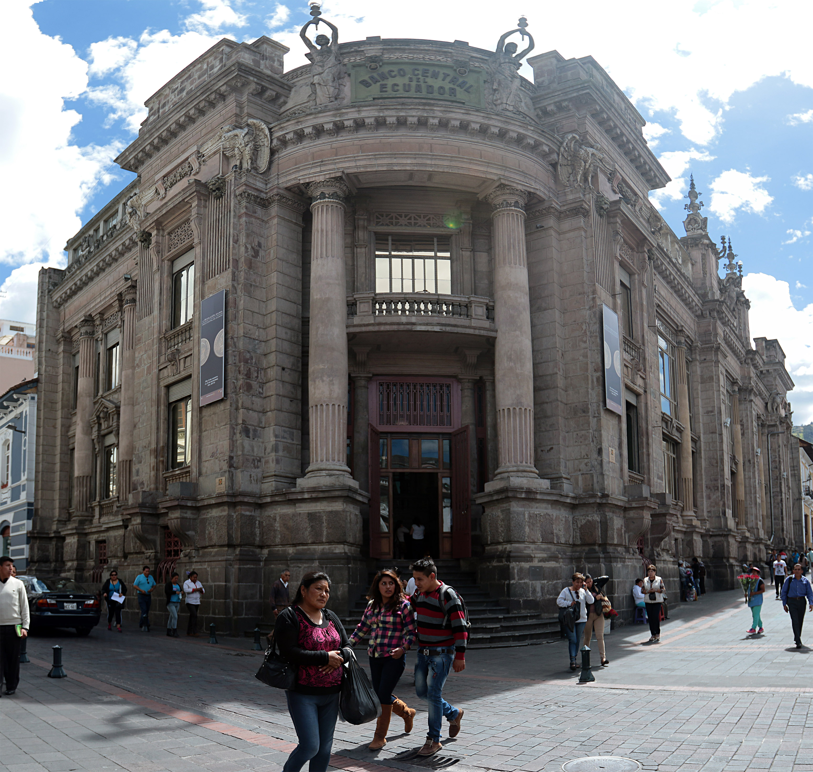 Quito, 7 Ago (Andes).- El museo Numismático del Banco Central del Ecuador acoge una muestra ilustrativa de la monedas que han circulado en el país, Carlos Iza, curador del Museo concedió una entrevista a Andes. Fotografías: Carlos Rodríguez/Andes.